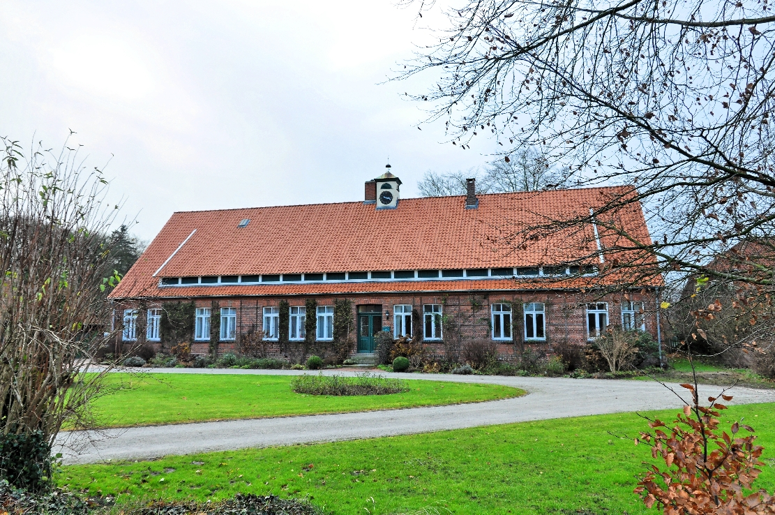 Kloster Neuenwalde, Zehntscheune, umgebaut, 2012